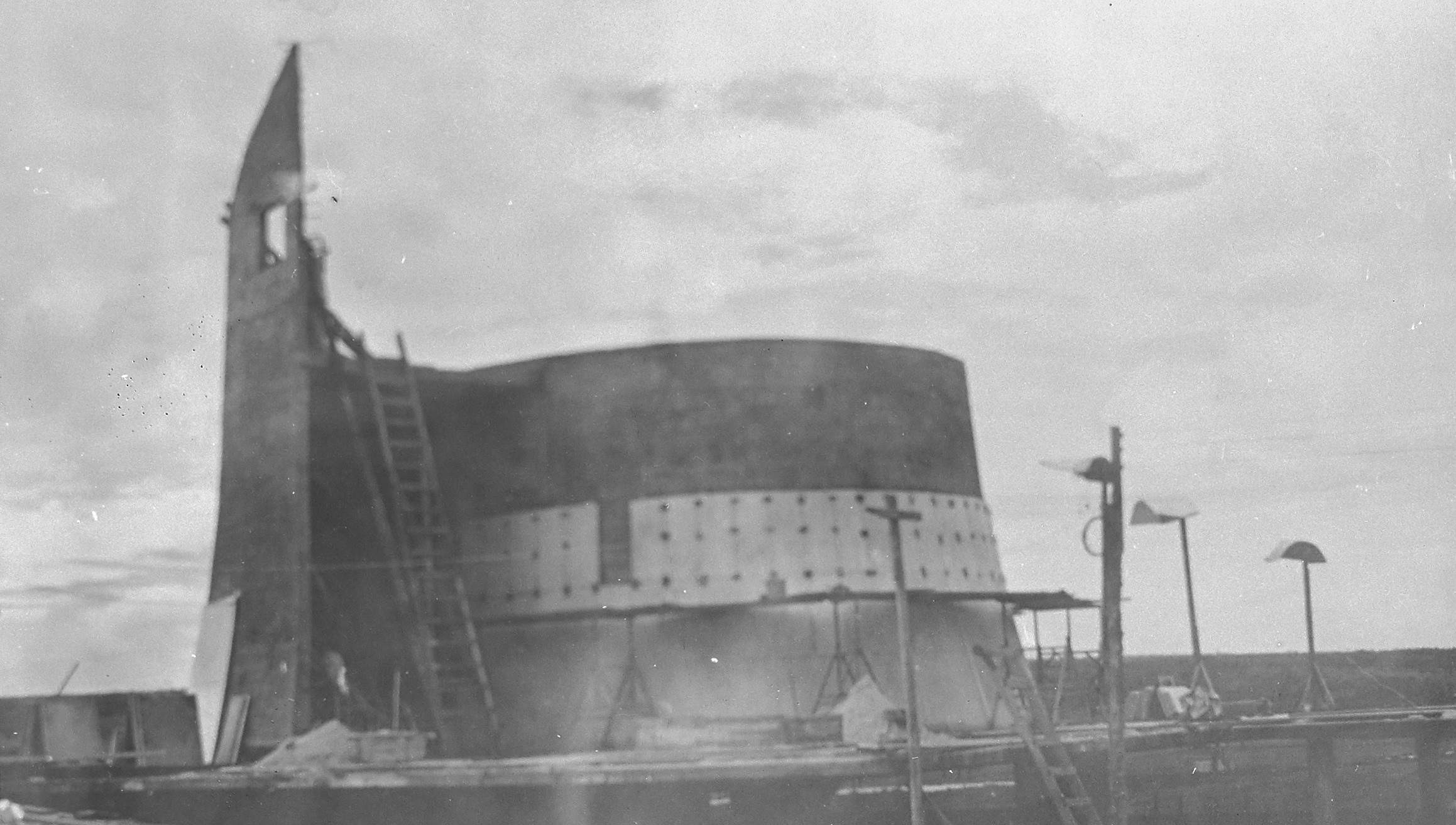 Vistas das obras do Palácio da Alvorada - Capela do Palácio